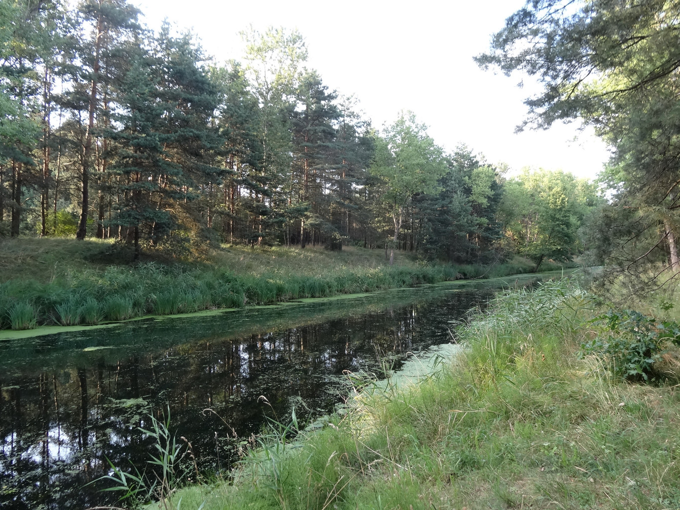 Kanał Górnonotecki w Murowańcu, gmina Białe Błota